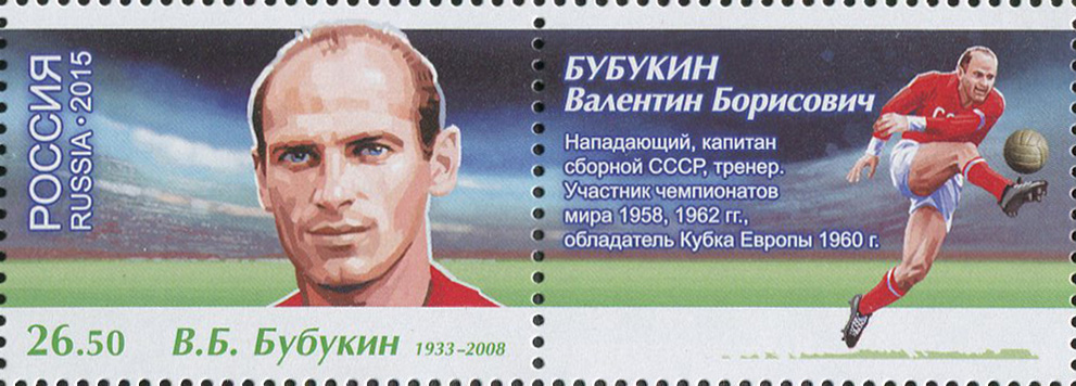 Чемпионат мира по футболу FIFA 2018 в России. Легенды футбола.В.Б. Бубукин (1933-2008)